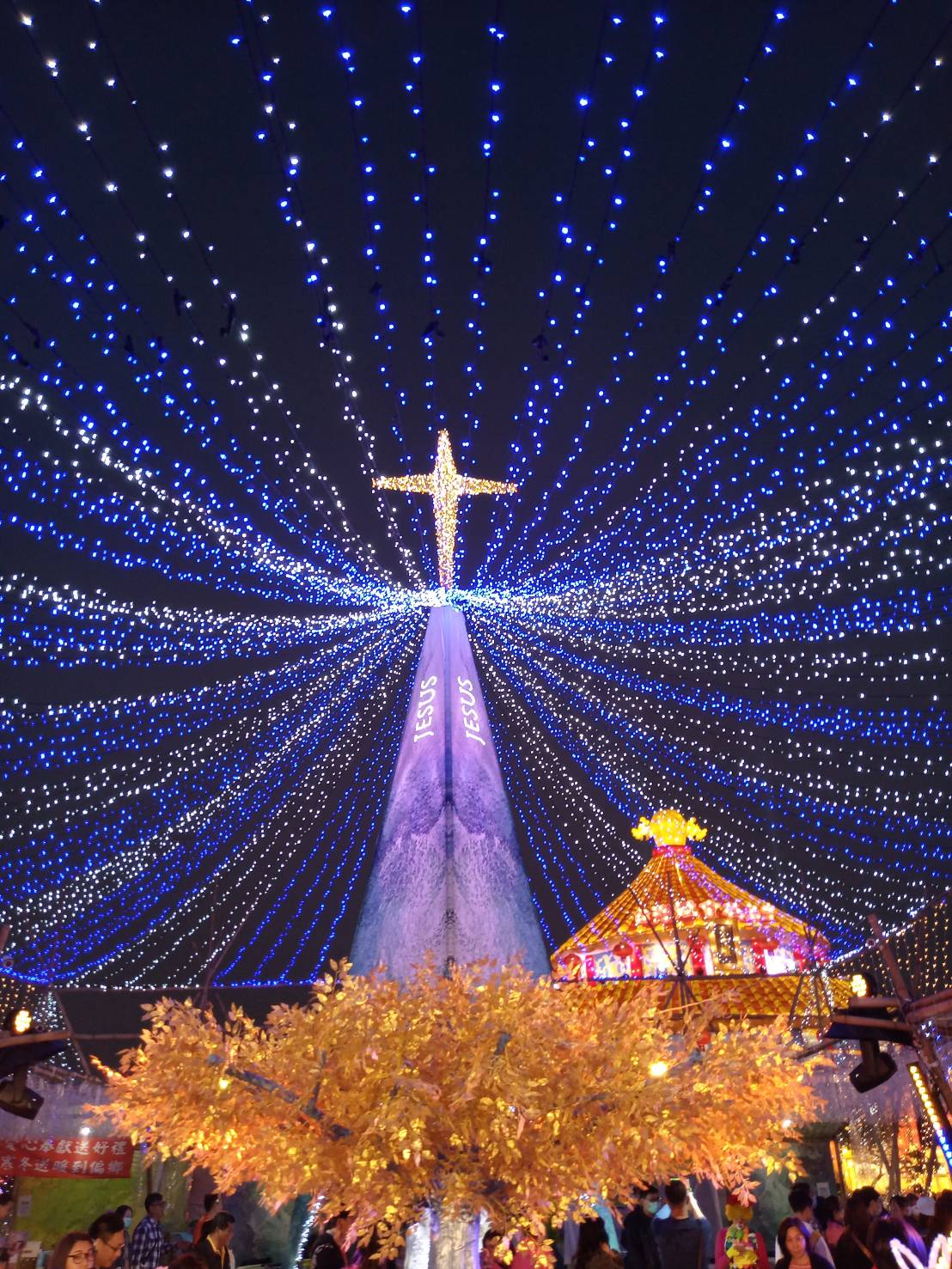 2020台灣燈會宗教區 This photo has been taken in the country: Taiwan